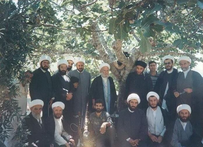 المرجع الشيعي الشيخ محمد تقي الفقيه مع مجموعة من طلابه وتلامذته